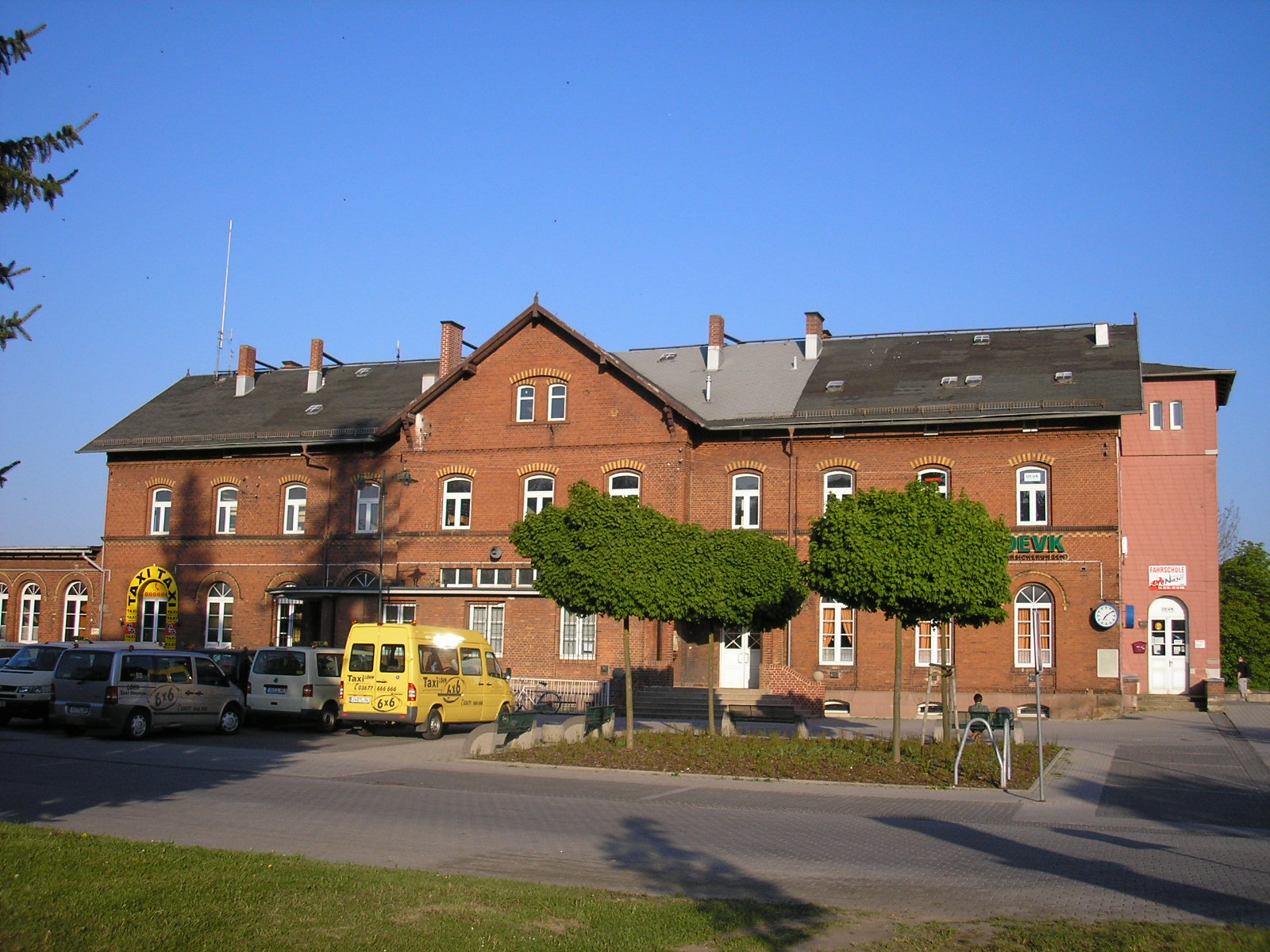 Bahnhofsgebäude von Ilmenau (Thüringen), straßenseitig betrachtet.